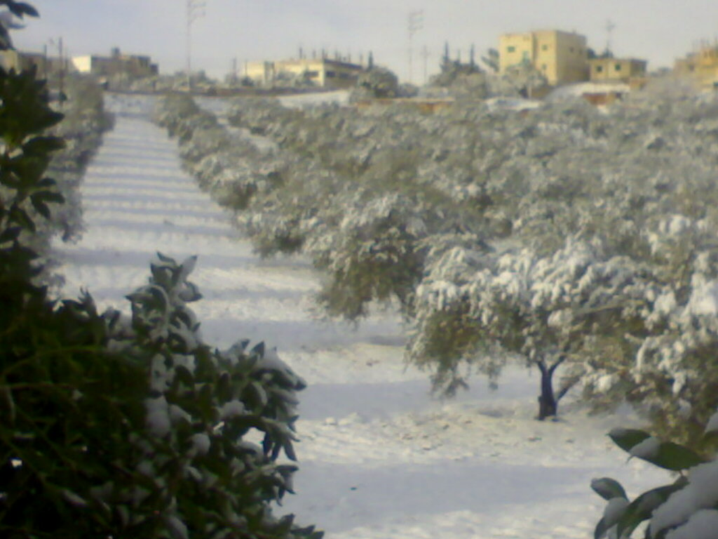 صورة من ثلوج شهر كانون الثاني عام 2008 في قرية أم النعام الغربية التابعة لمحافظة المفرق في الأردن